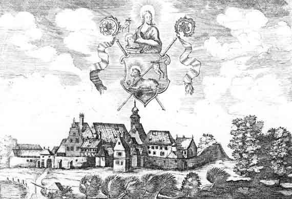 Ansicht des Klosters Berge, Kupferstich um 1580